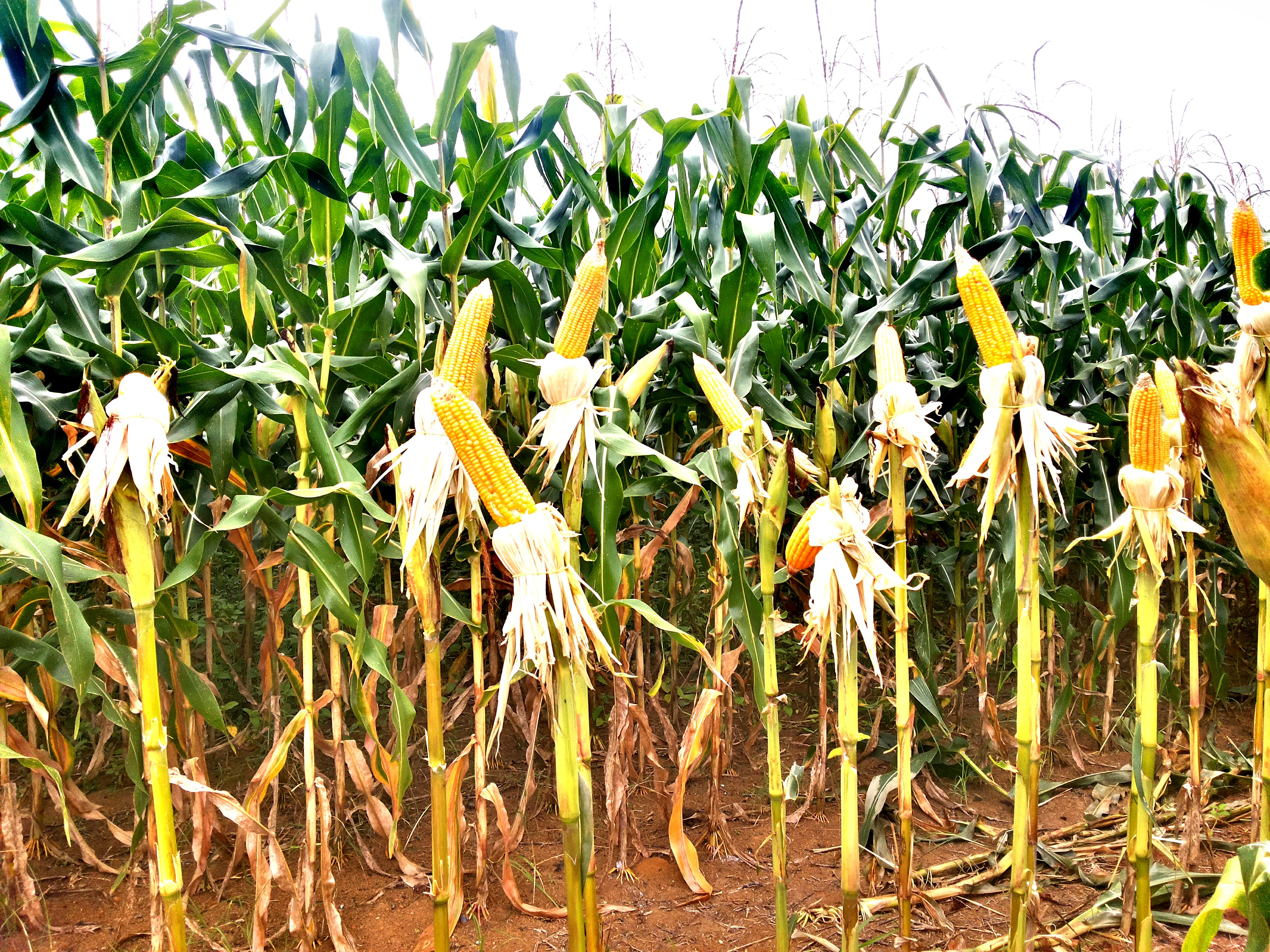 Áreas de Produção de Milho